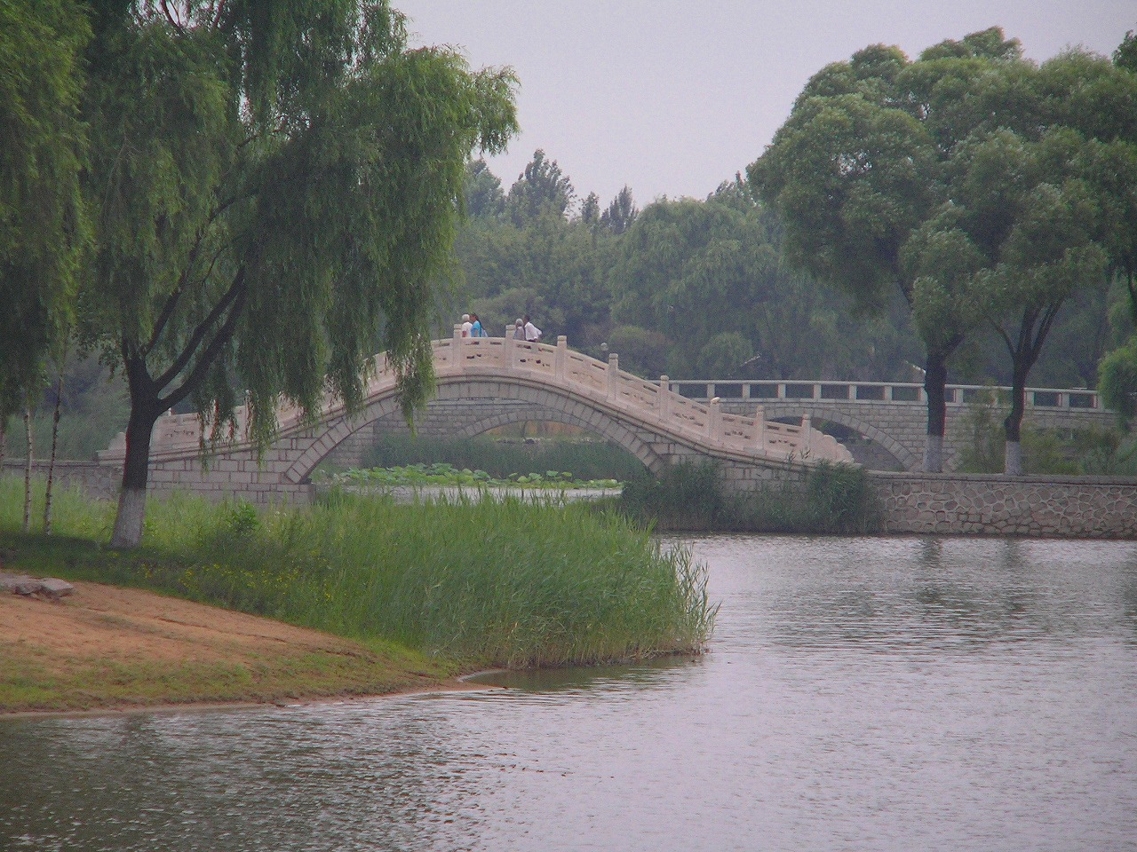 水閣雲天 1980年に着工し、1981年竣工。面積は約1515㎡。水閣雲天の命名は黒竜江省の元省長の陳雷による。2005年の3期改造工事の中で、この地区は中国風から洋風に改められた。水閣雲天の「水」は太陽湖という人工湖で、ハルビン市民が1980年メーデーの際に労働奉仕により造成した。太陽山は公園内でも主要な景観を形成している。また「閣」は、近代的な庭園の造景手法を採用し、洋風の建築とも融合し、シダレヤナギが湖面に投影する光景が岸辺に建つ東屋とともに見事な景観を織りなしている。